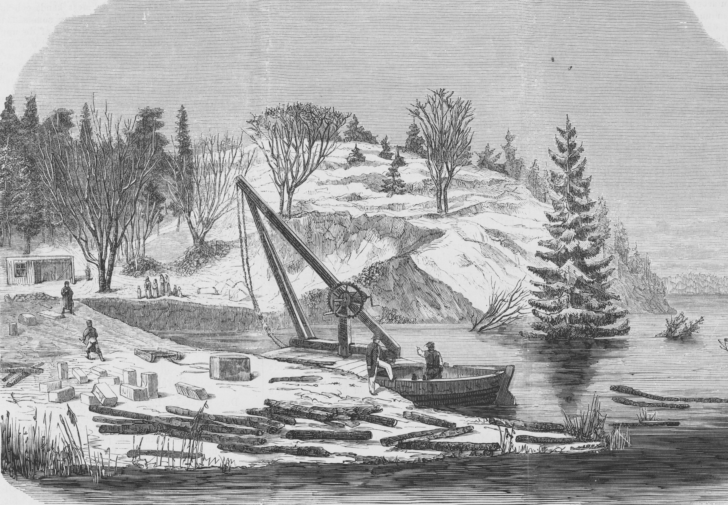 Huvudsta stenbrott efter jordraset